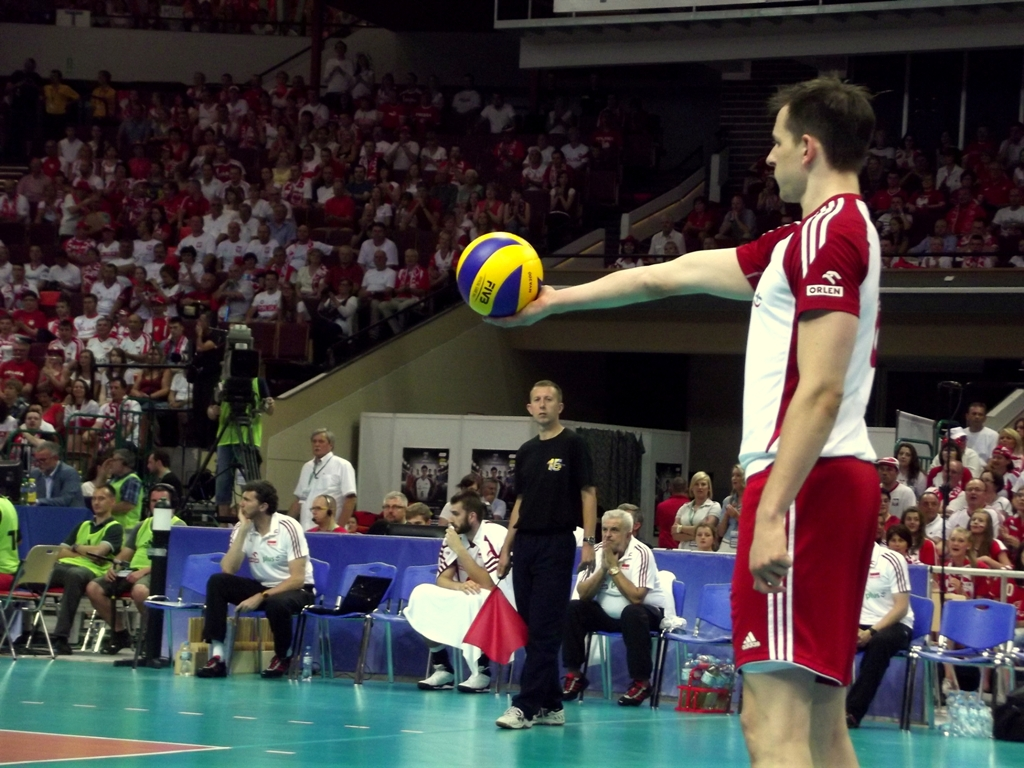 Zdjęcie zrobione podczas meczu Polska - USA siatkarskiej Ligii Światowej w katowickim Spodku.